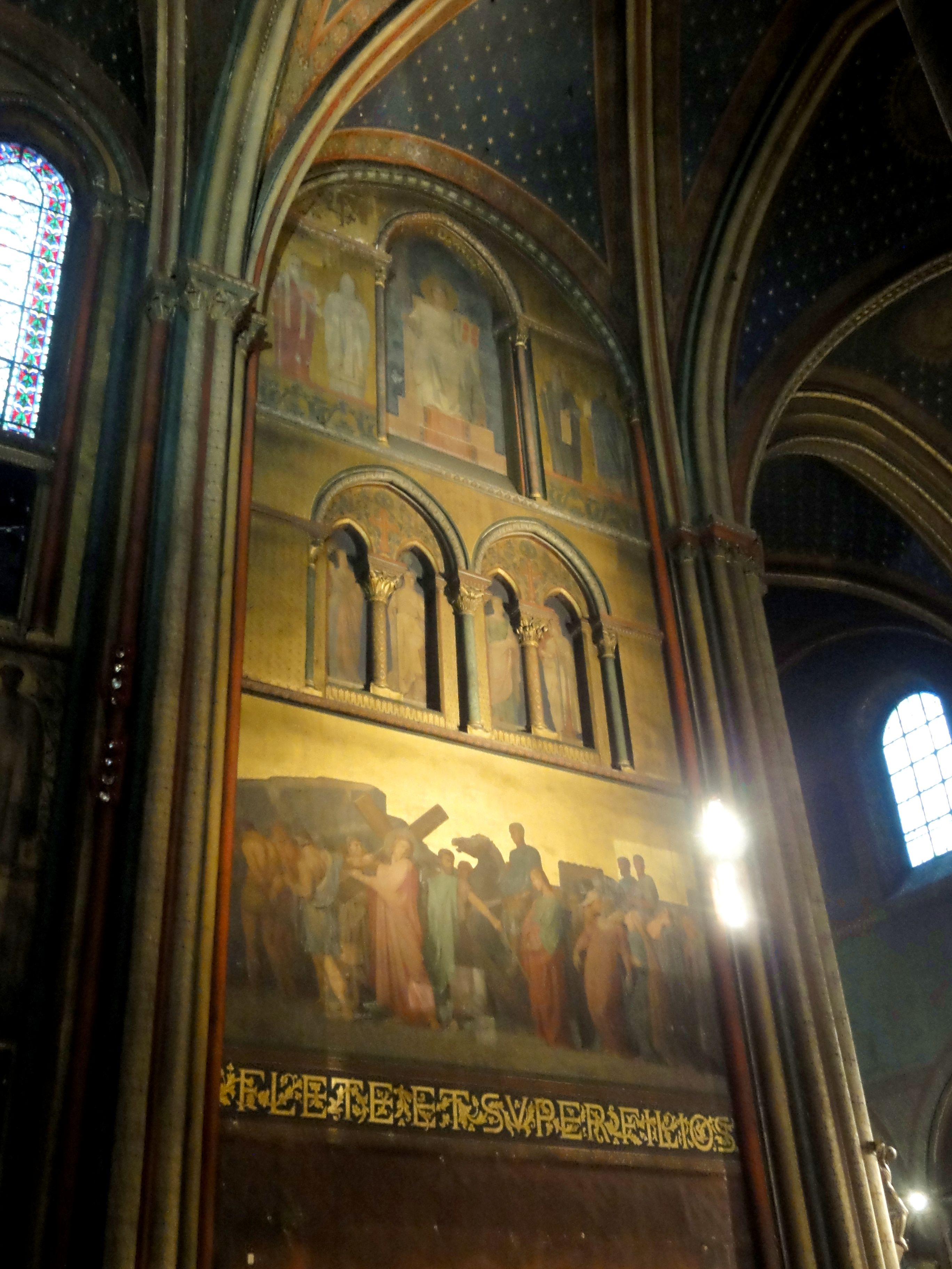 Clocher sud, côté nord .